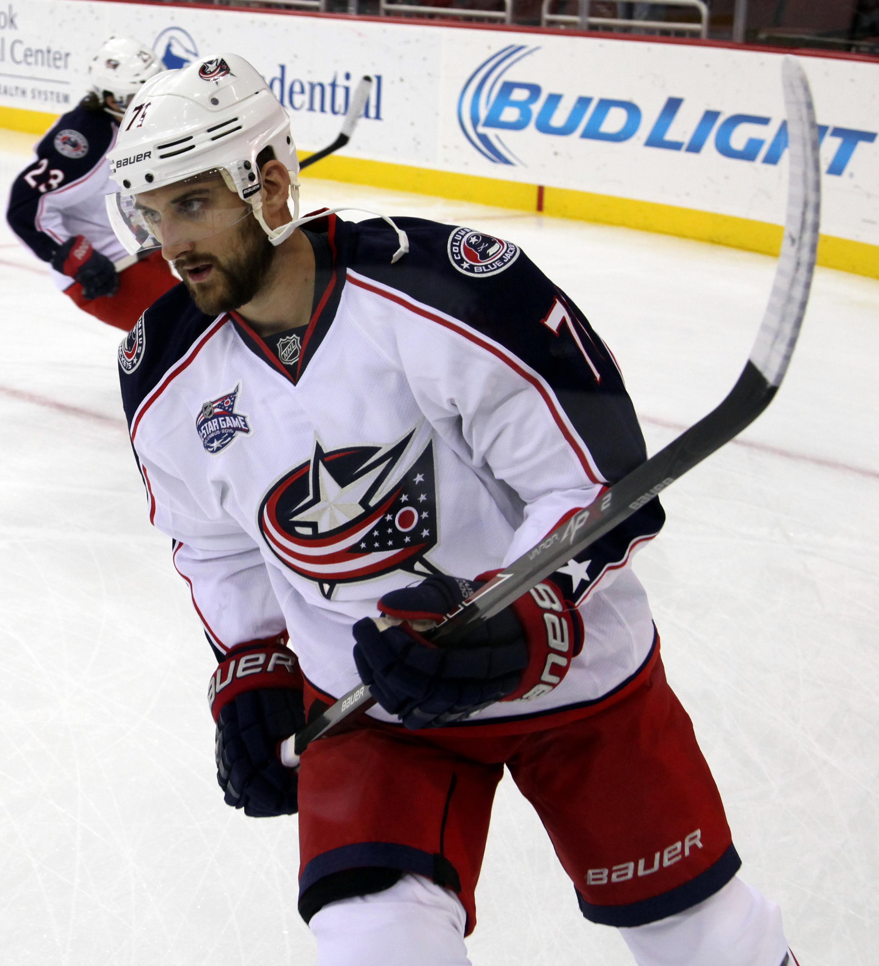 Foligno in November 2014.